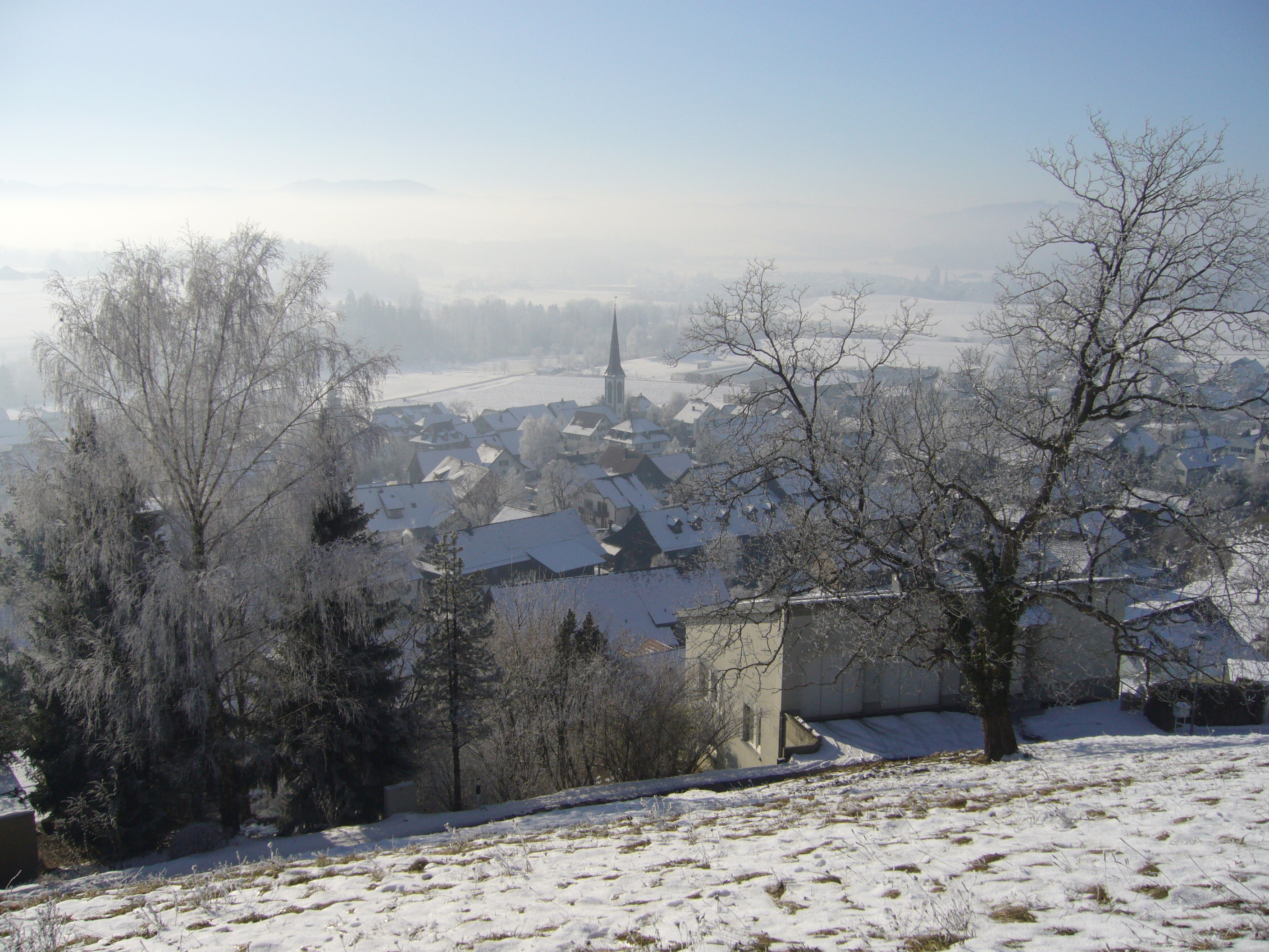 Blick vom Südhang des Sonnenbergs aufs Dorf zu Stettfurt.